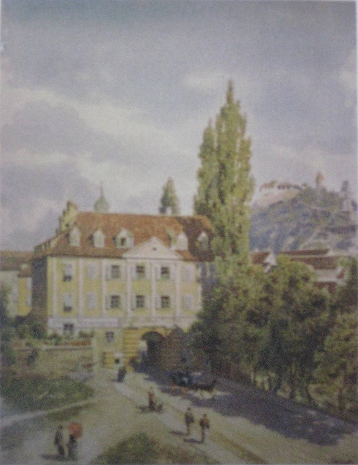 Neutor in Graz